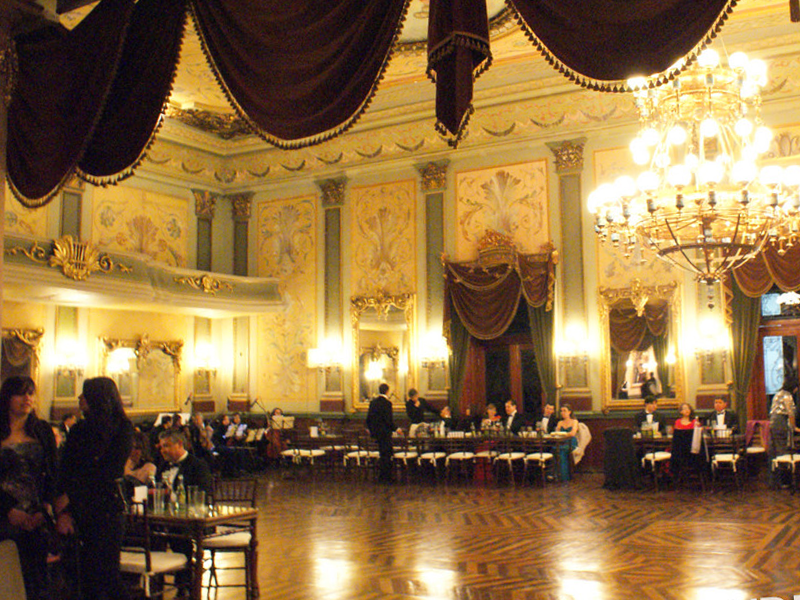 Salón Principal de la Sociedad Potosina La Lonja, en el centro histórico de la ciudad de San Luis Potosí, México